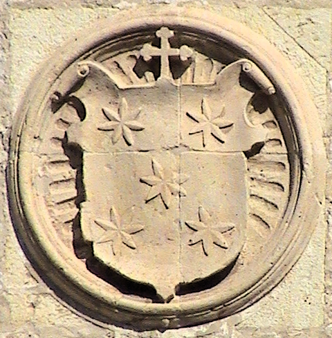 Escudo de armas del arzobispo de Toledo Alonso de Fonseca y Ulloa, situado en el Palacio Arzobispal de Alcalá de Henares (Comunidad de Madrid - España).